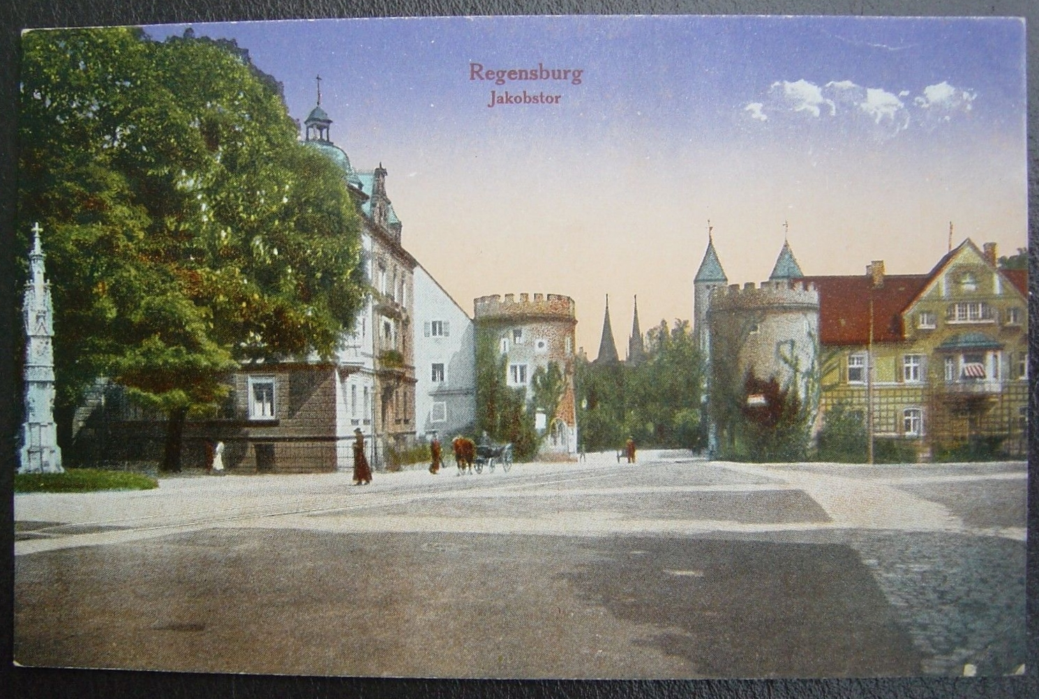 Ansichtskarte - Photo - coloriert - "Regensburg Jakobstor"